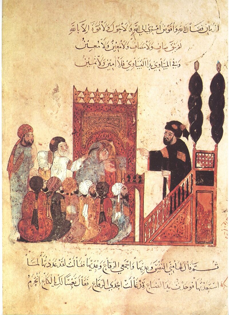 מטיף במסגד יום השישי עומד על מינבר וברקע ניסי הח'ליפות העבאסית